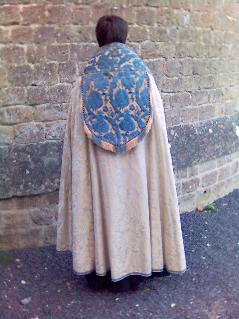 Capa pluvial (espalda) Picture of Anglican priest wearing a cope, taken from the back, by Gareth Hughes, on 21 October 2005.